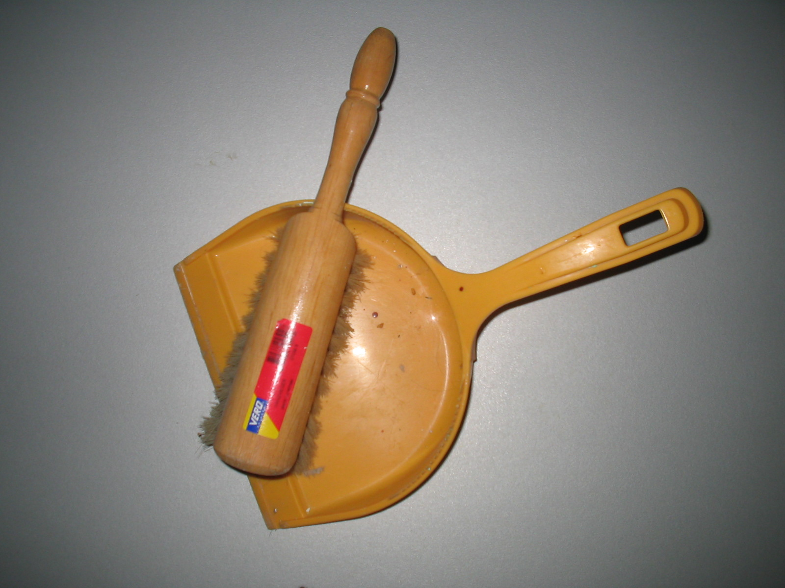 stoffer en blik